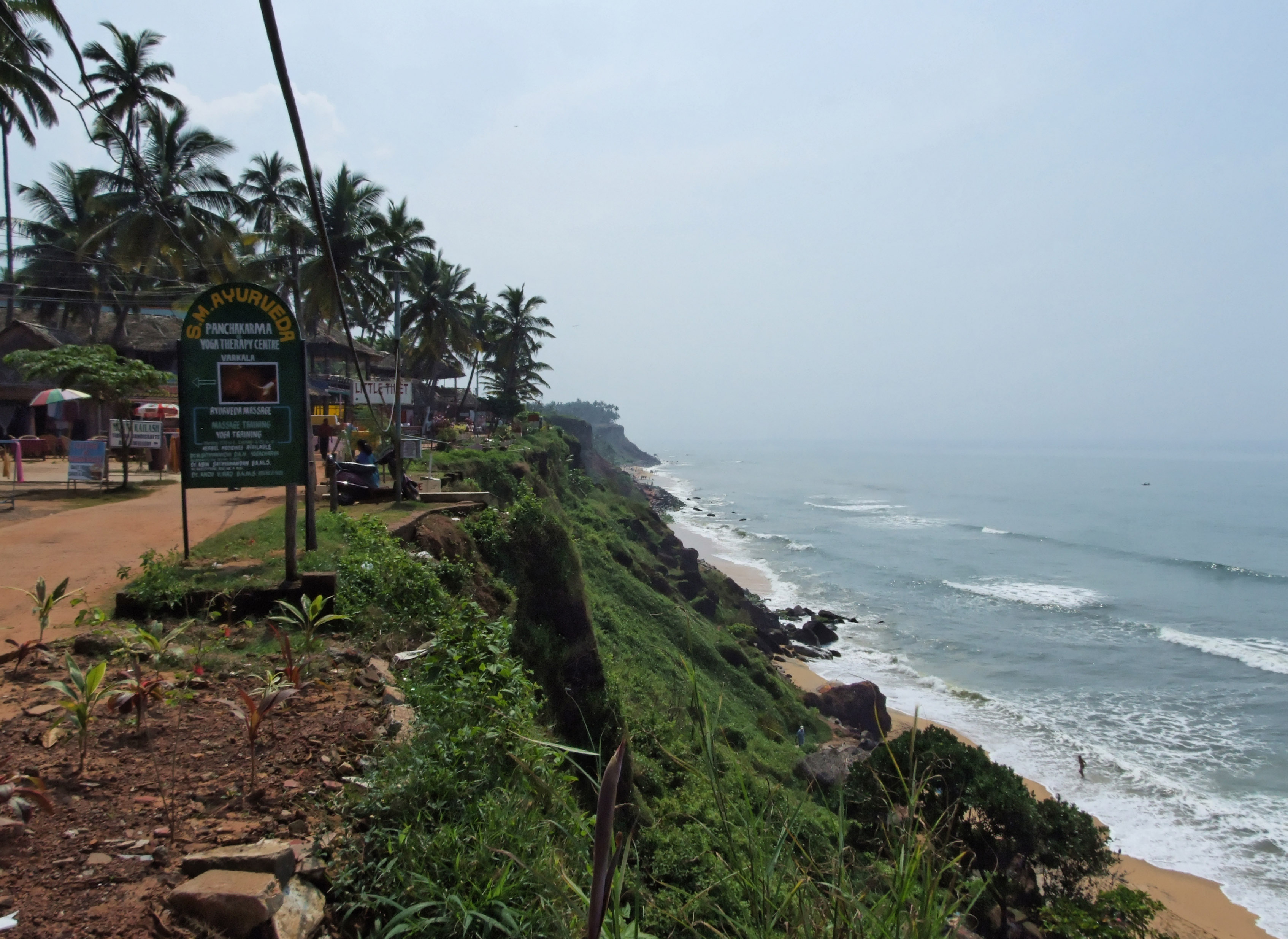 Varkala Clif, Kerala, India